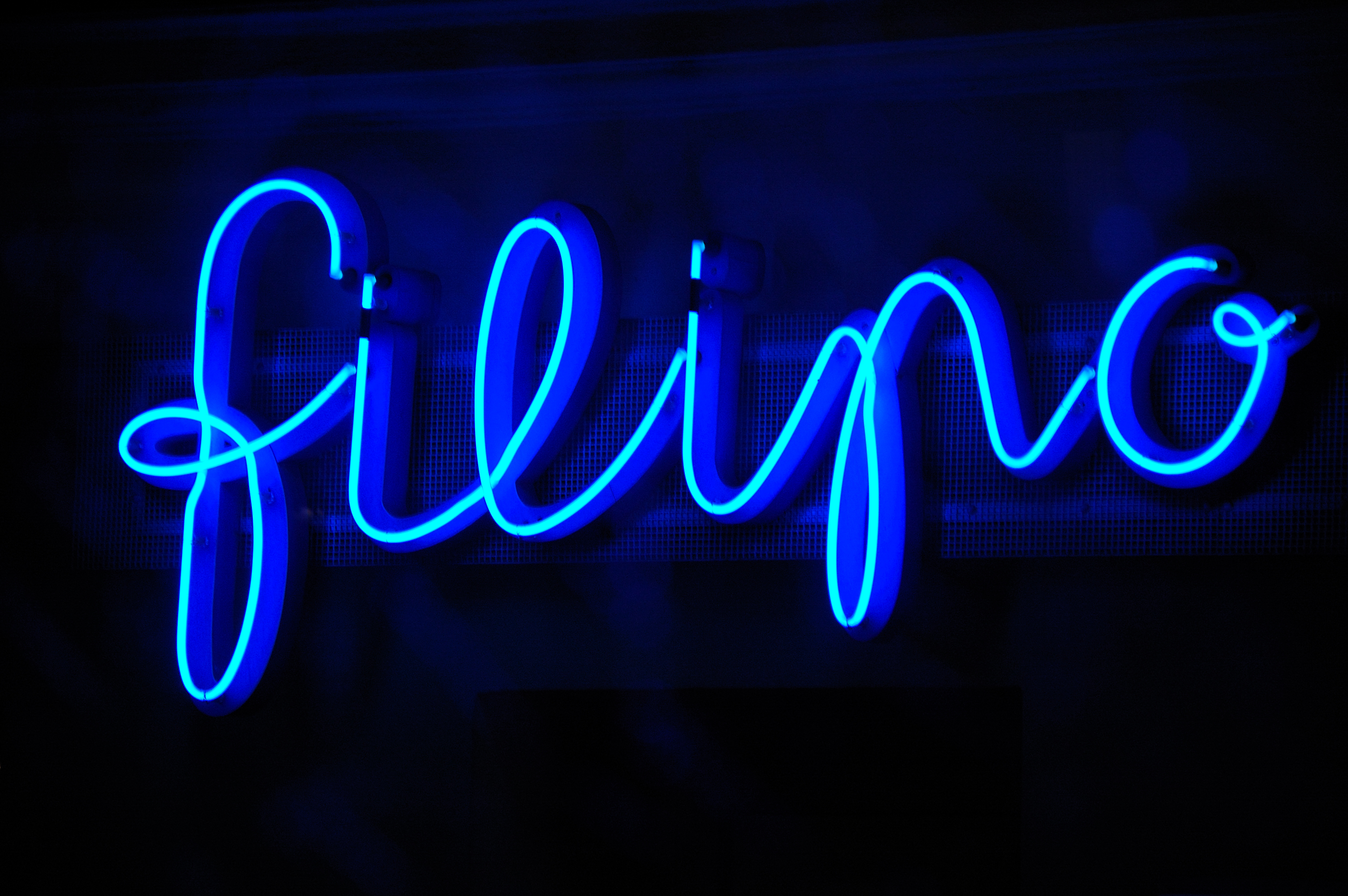 Filipo